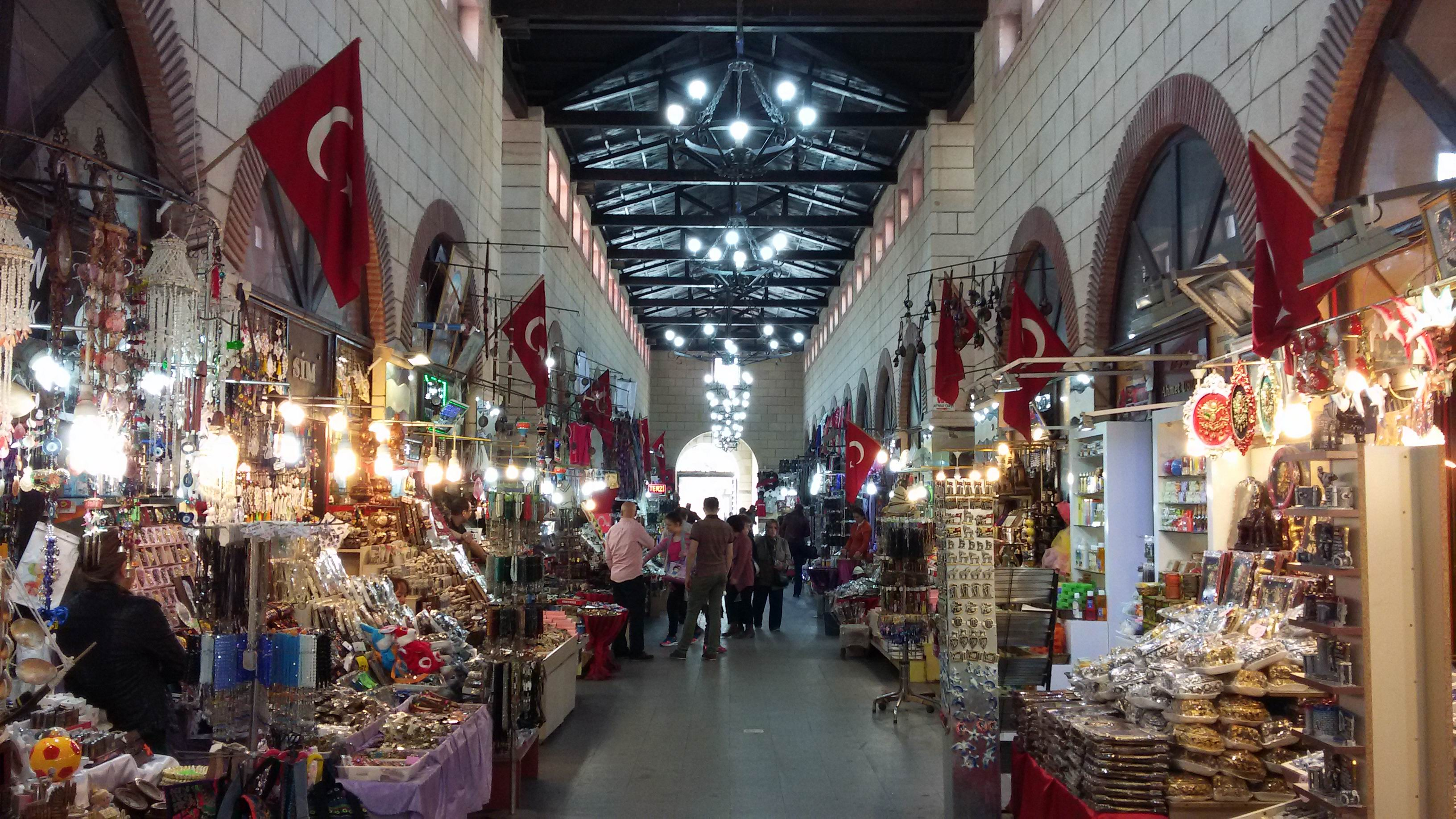 Aynalı Çarşı Fotoğraf:Ayhan ÖNCÜ/Çanakkale